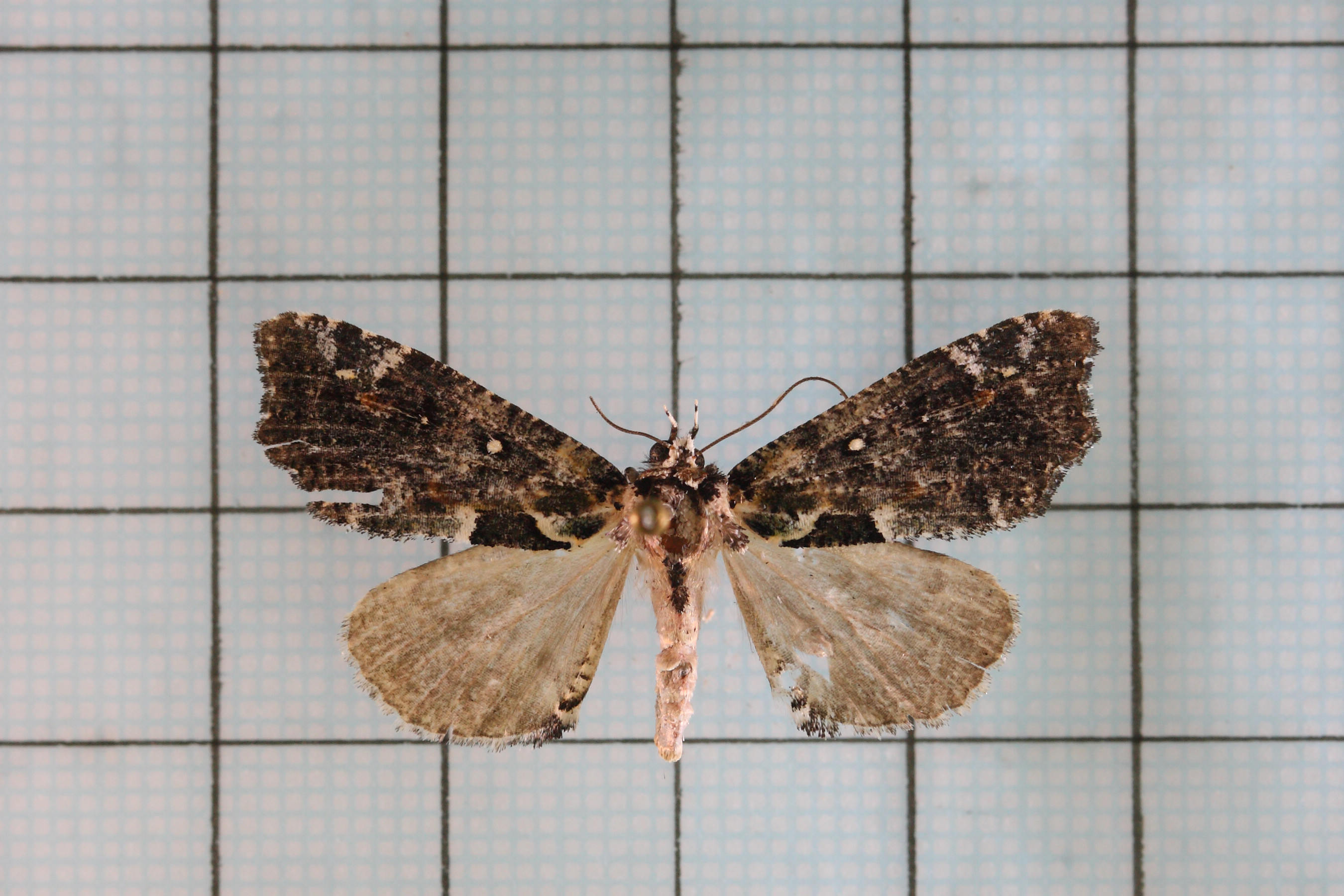 Perciana marmorea Walker 修夜蛾 鞍1:P.65,Pl.16-23